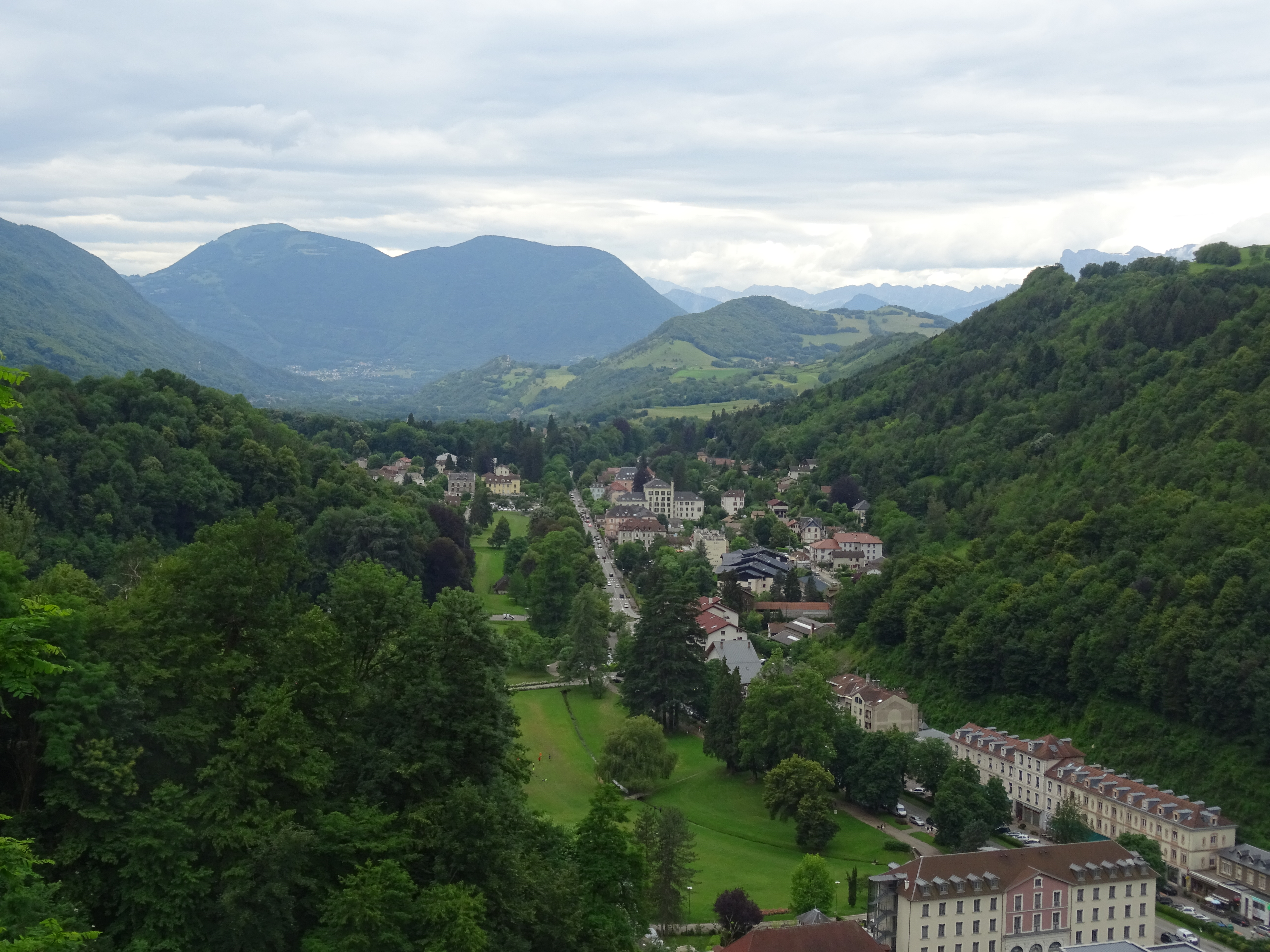 Uriage (et Valnavey-le-Haut). Vue de la terrasse du château d'Uriage.